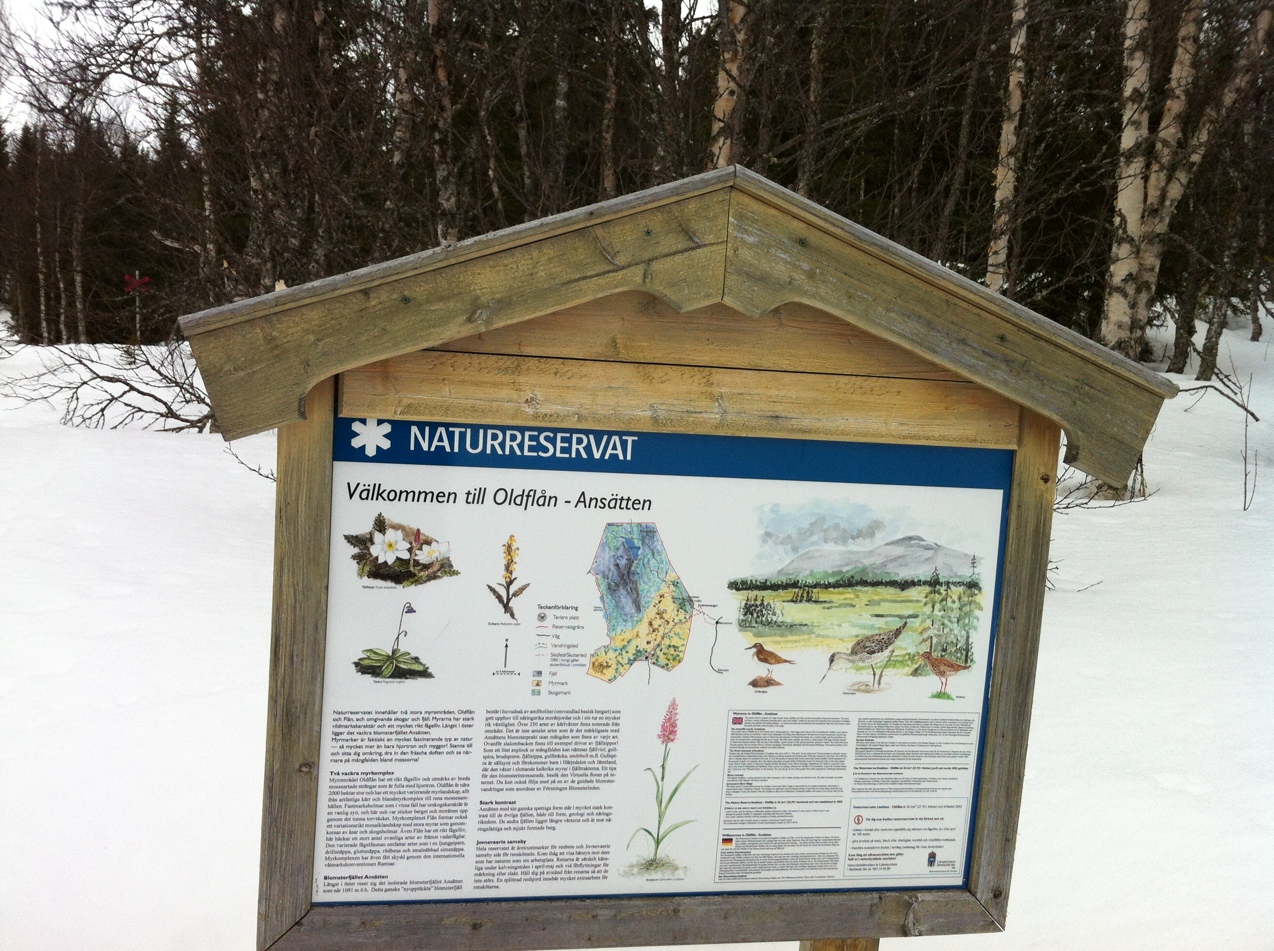 Oldflån, Offerdal, Krokoms kommun